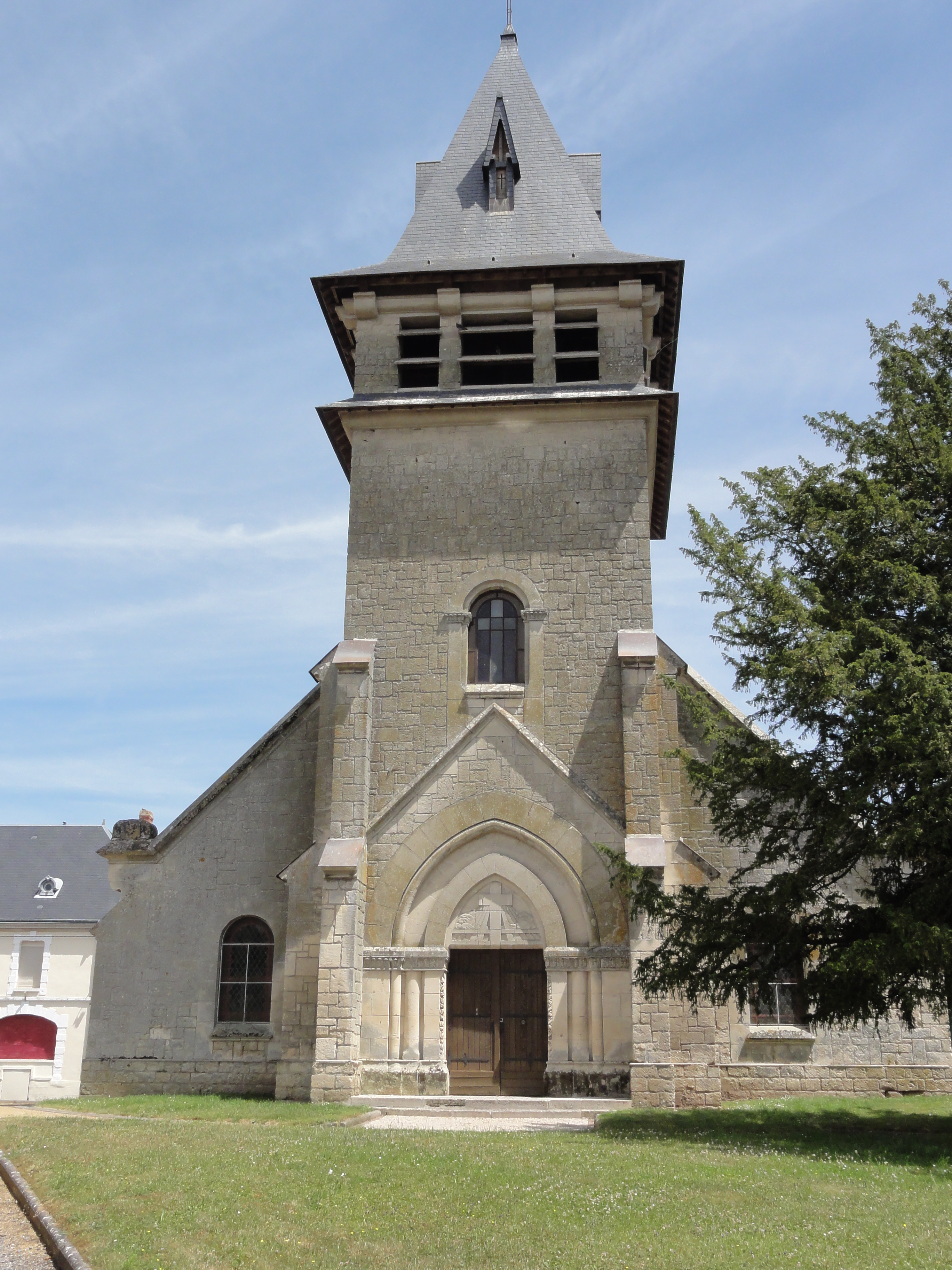 Moulins (Aisne) église